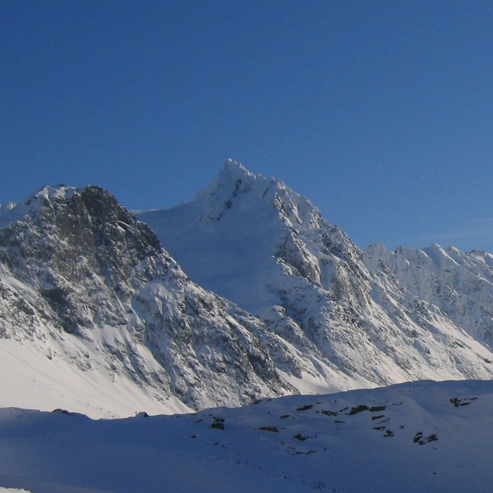 Romedalstinden, Ørsta, Sunnmøre,Norway